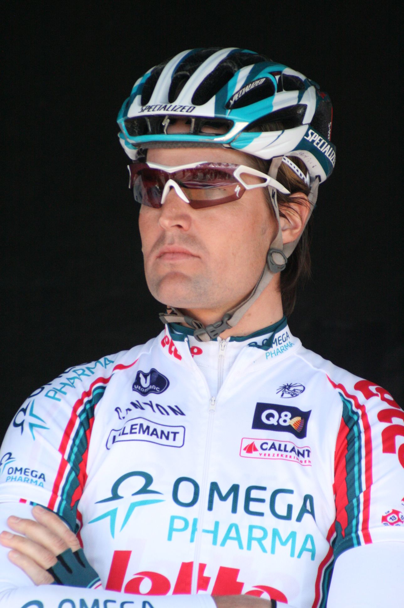 Gerben Löwik, lors de la présentation des équipes des 4 jours de Dunkerque 2010